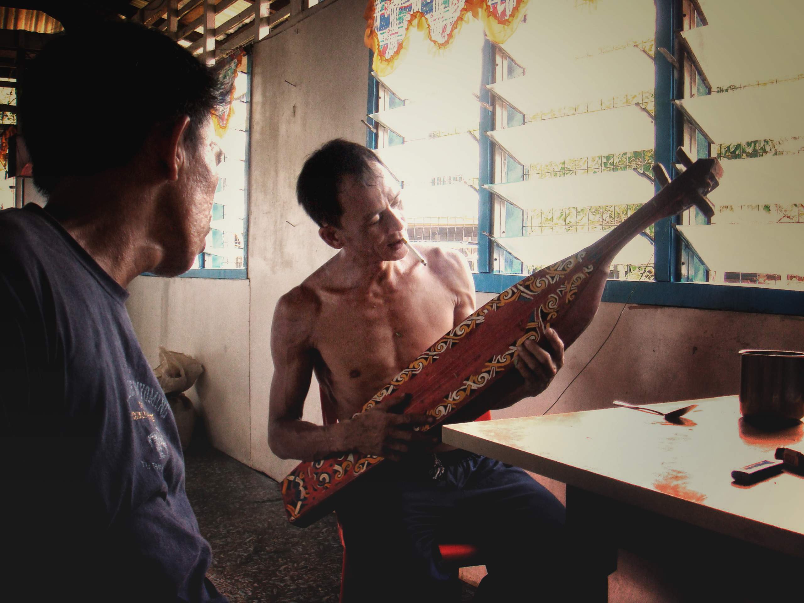 Sape Player, Kayan Tribe, Sarawak